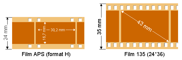 Dimensions des pellicules APS et 135